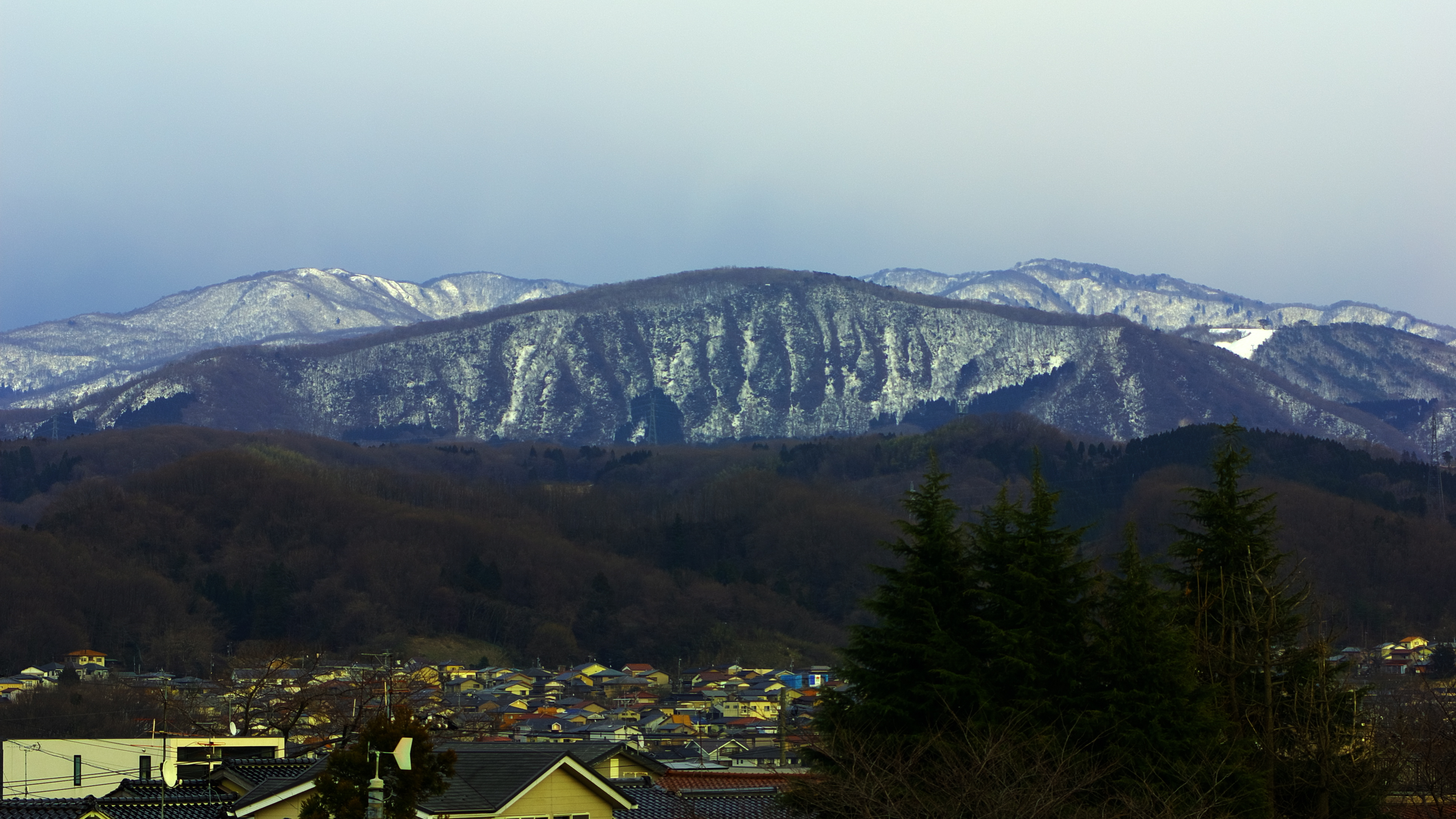 小立野旧金沢大学工学部からみた戸室山。溶岩ドーム。参照: 産総研地質調査総合センター